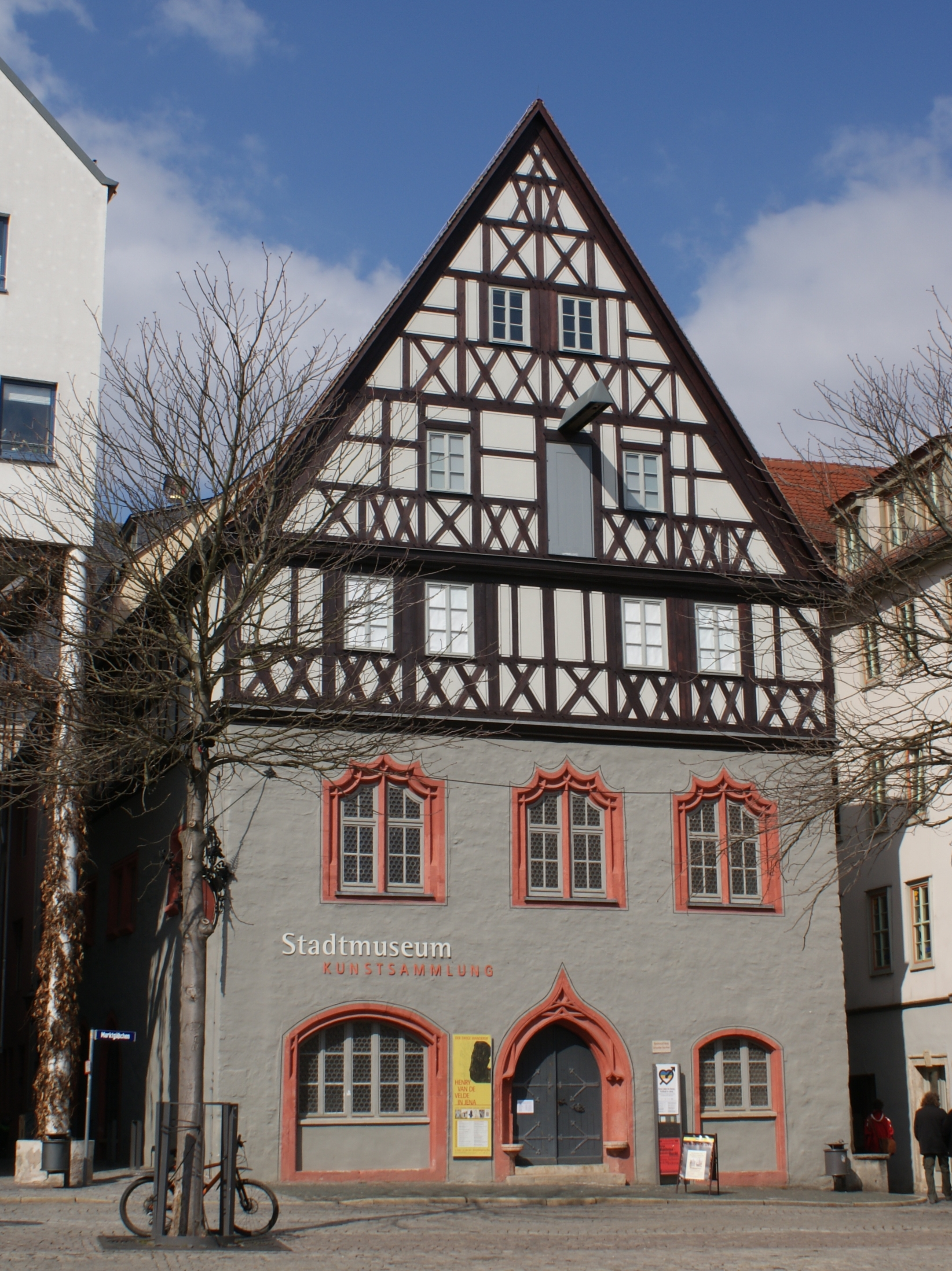 Die Göhre in Jena. Das Gebäude beherbergt heute das Stadtmuseum.